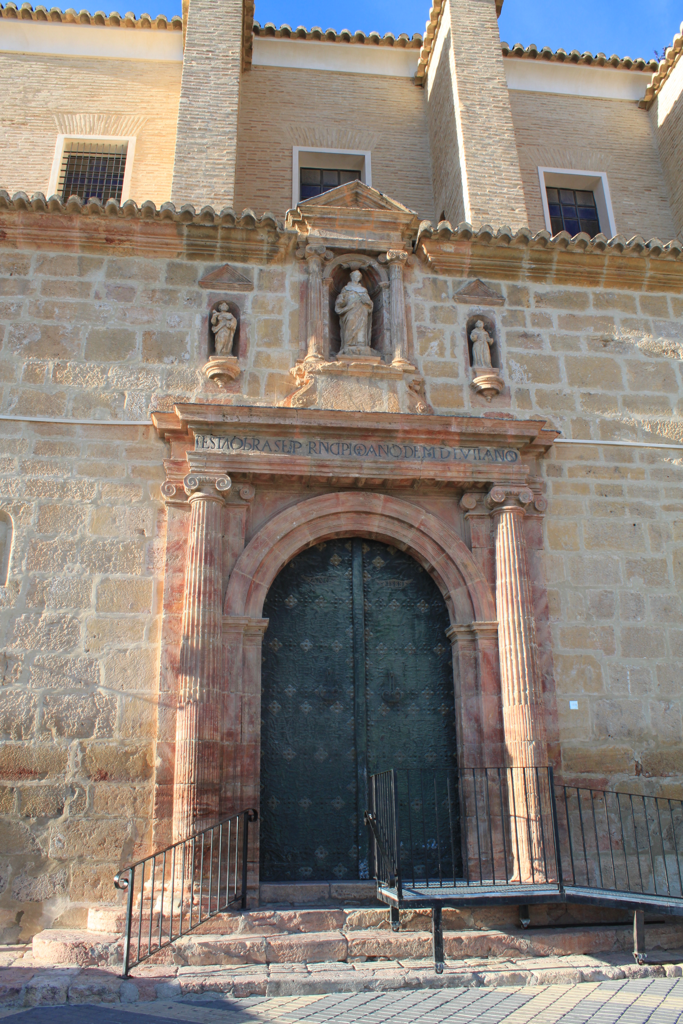 Portada renacentista de la Iglesia de Santo Domingo, Mula, Región de Murcia, España.